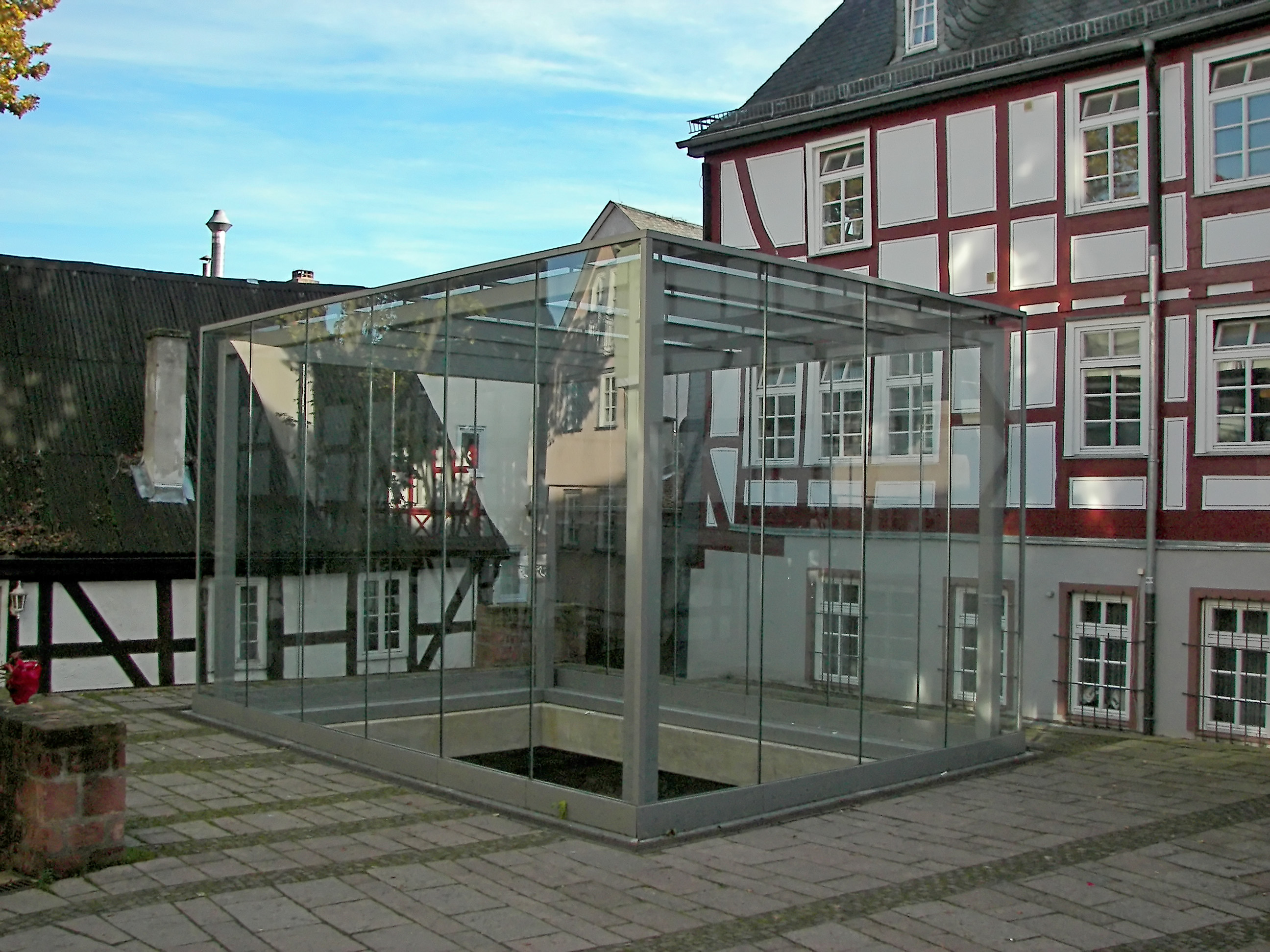 Marburg, Alte Synagoge, Ecke Mainzer Gasse / Schloßsteig